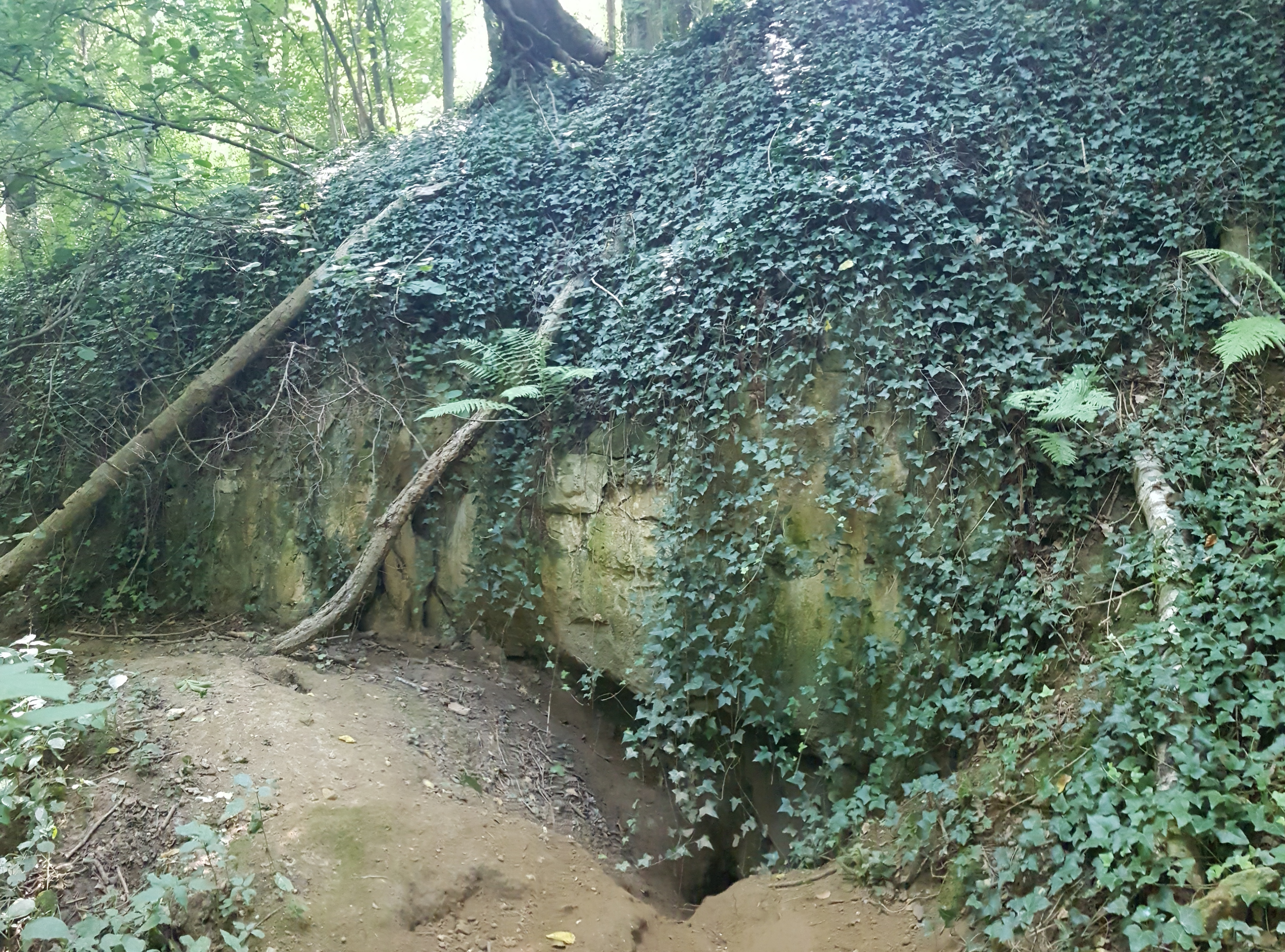 Groeve Essenbosch II in het Sint-Jansbosch, Oud-Valkenburg, Nederland